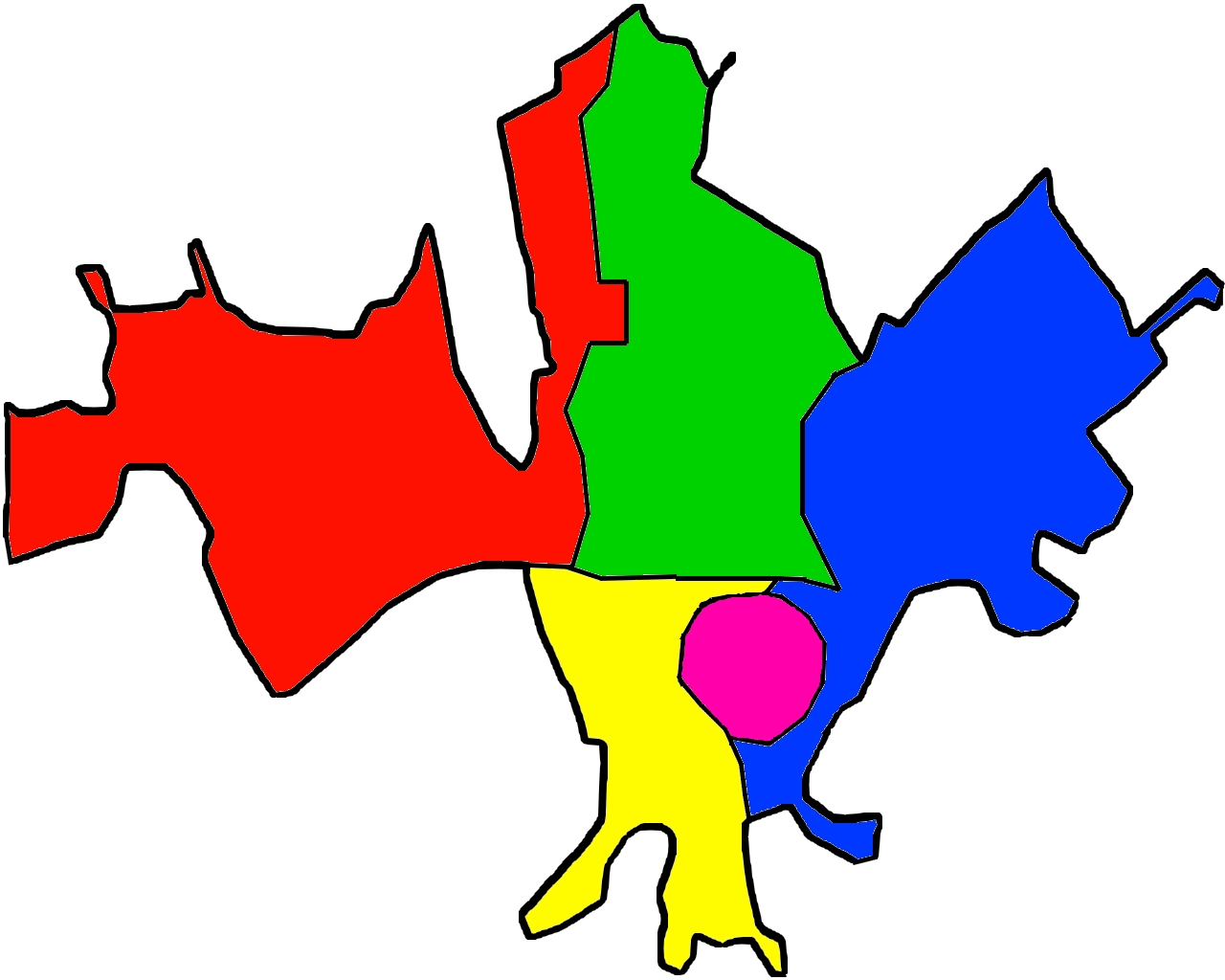 Mapa das Zonas de Guaratinguetá para Pré definições